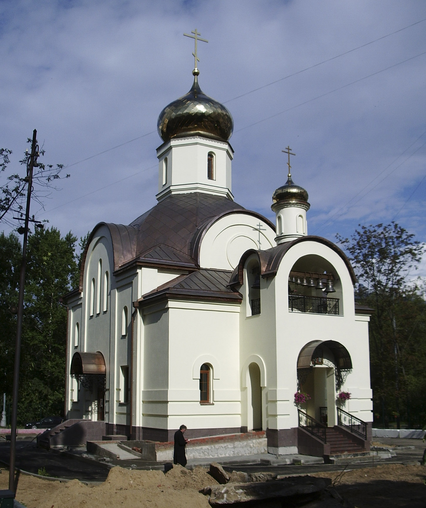 Храм Святых Царственных Страстотерпцев в Москве на 6-м Новоподмосковном переулке